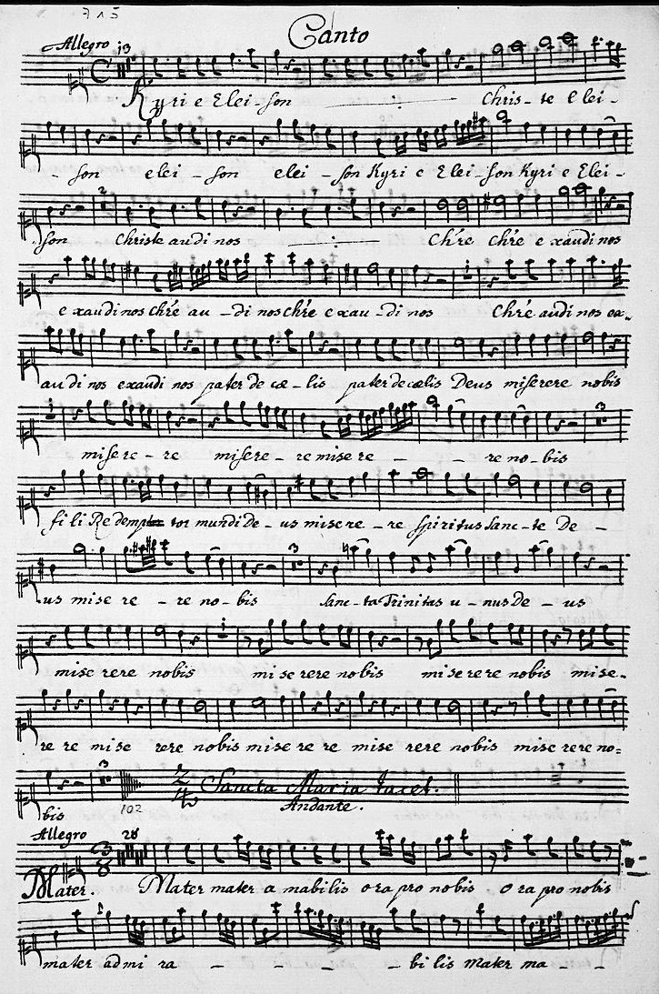 Franz Xaver Brixi, Litanei für vierstimmigen Chor, Solisten und Instrumente